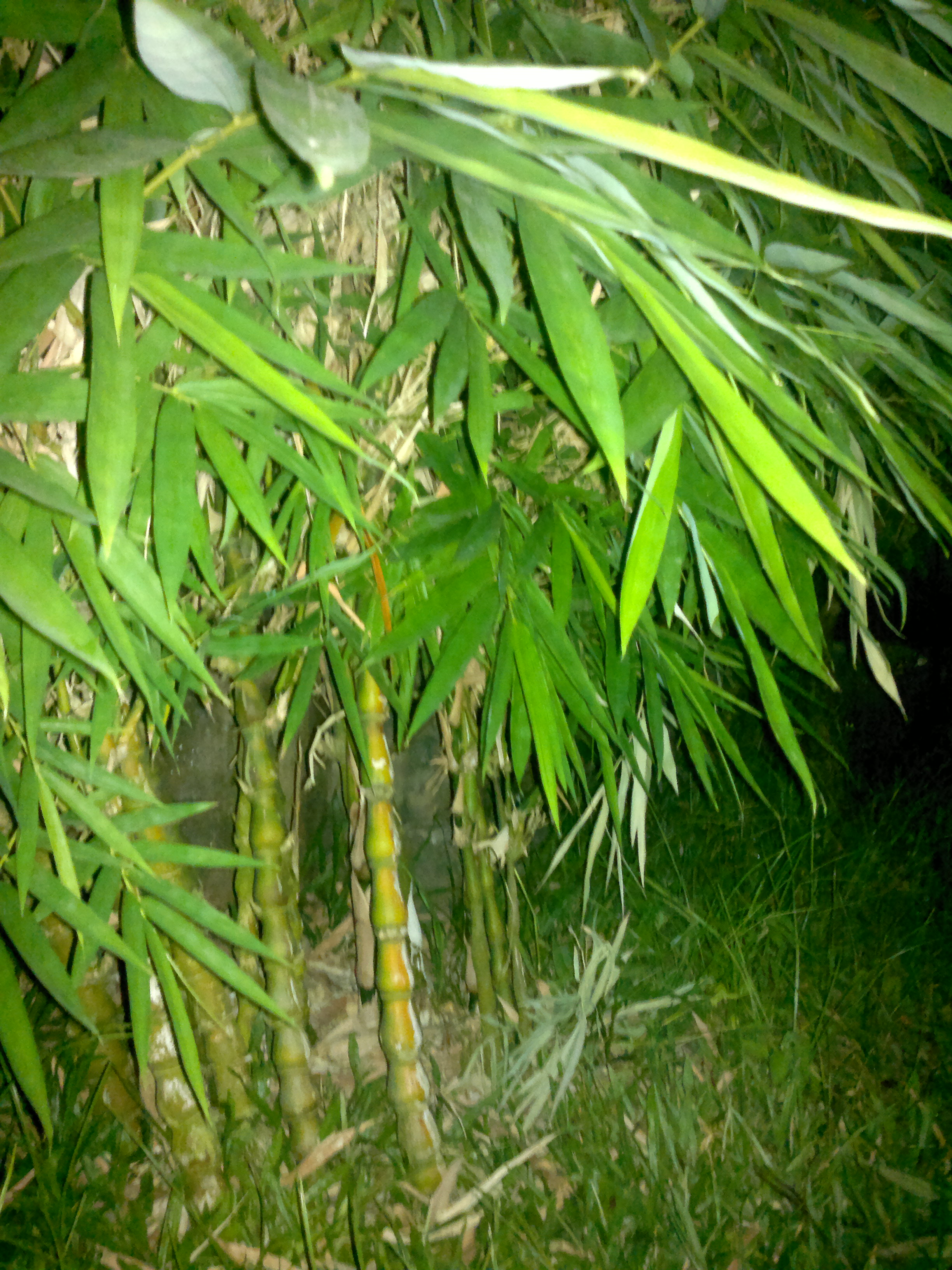 ഒരു സുഹൃത്തിന്റെ വീട്ടിൽ നിന്നും